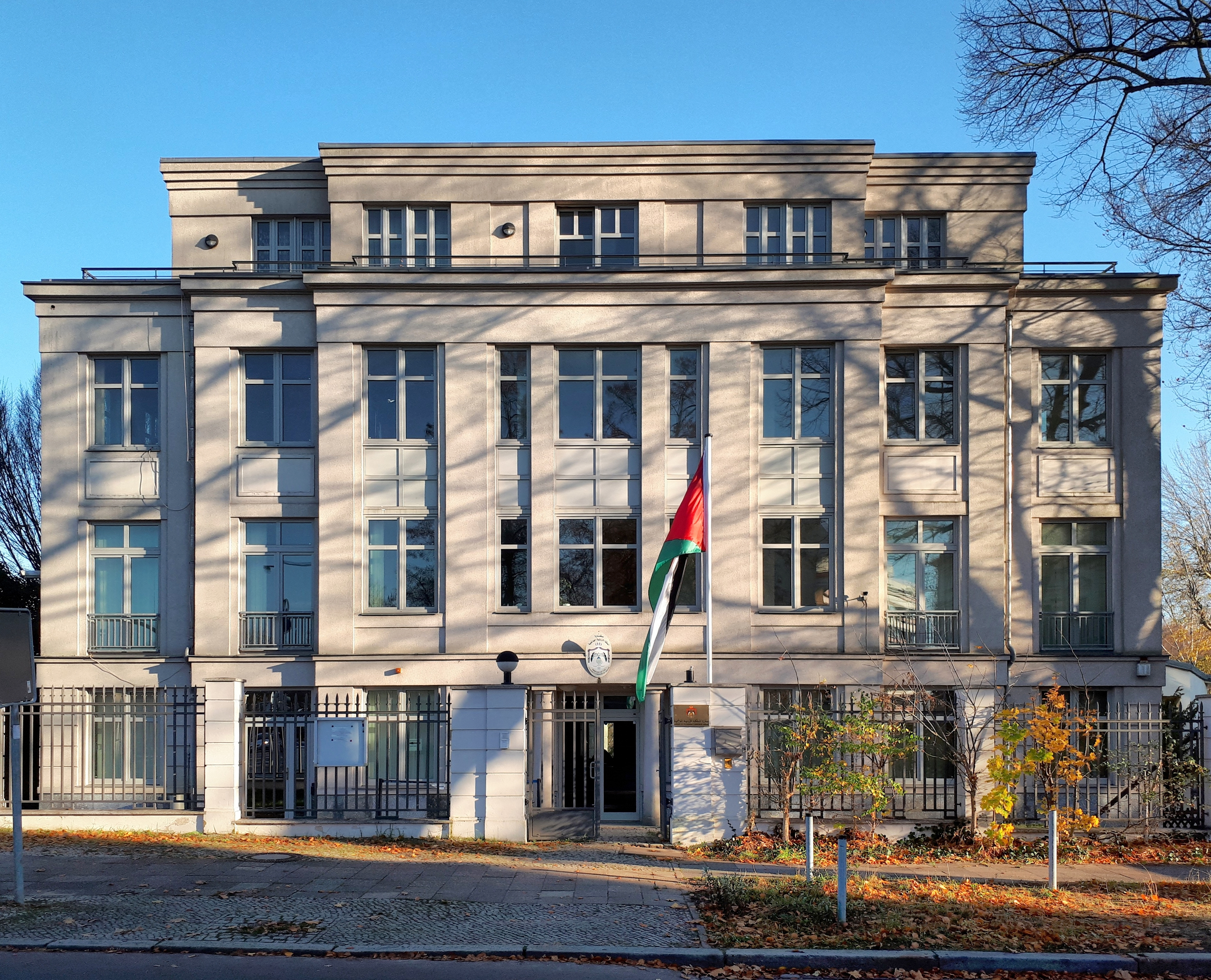 Pichelsdorf Heerstraße 201 Ecke Alt-Pichelsdorf Jordanische Botschaft